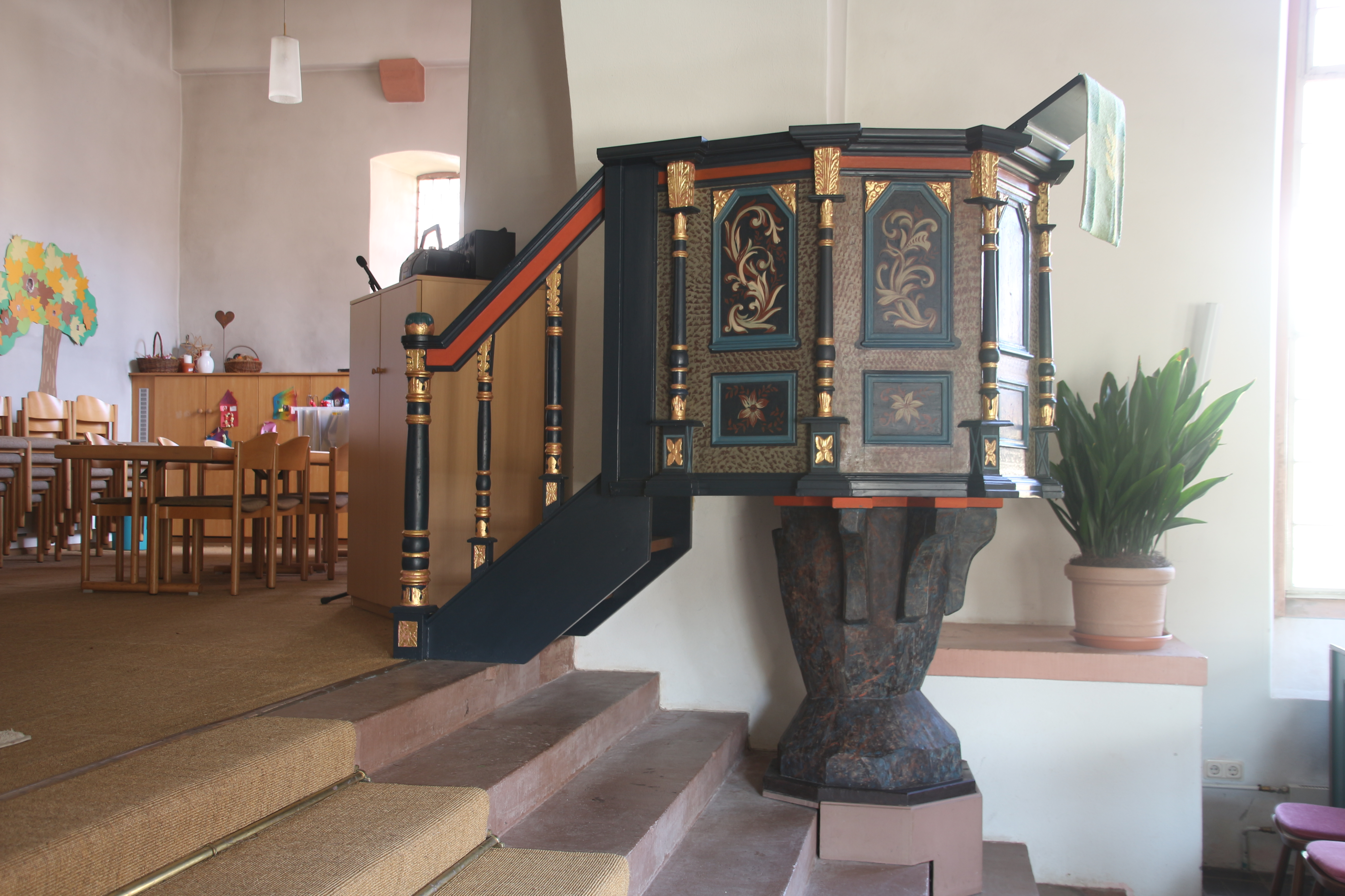 Evangelische Kirche Fauerbach, Gemeinde Nidda, Wetteraukreis, Hessen